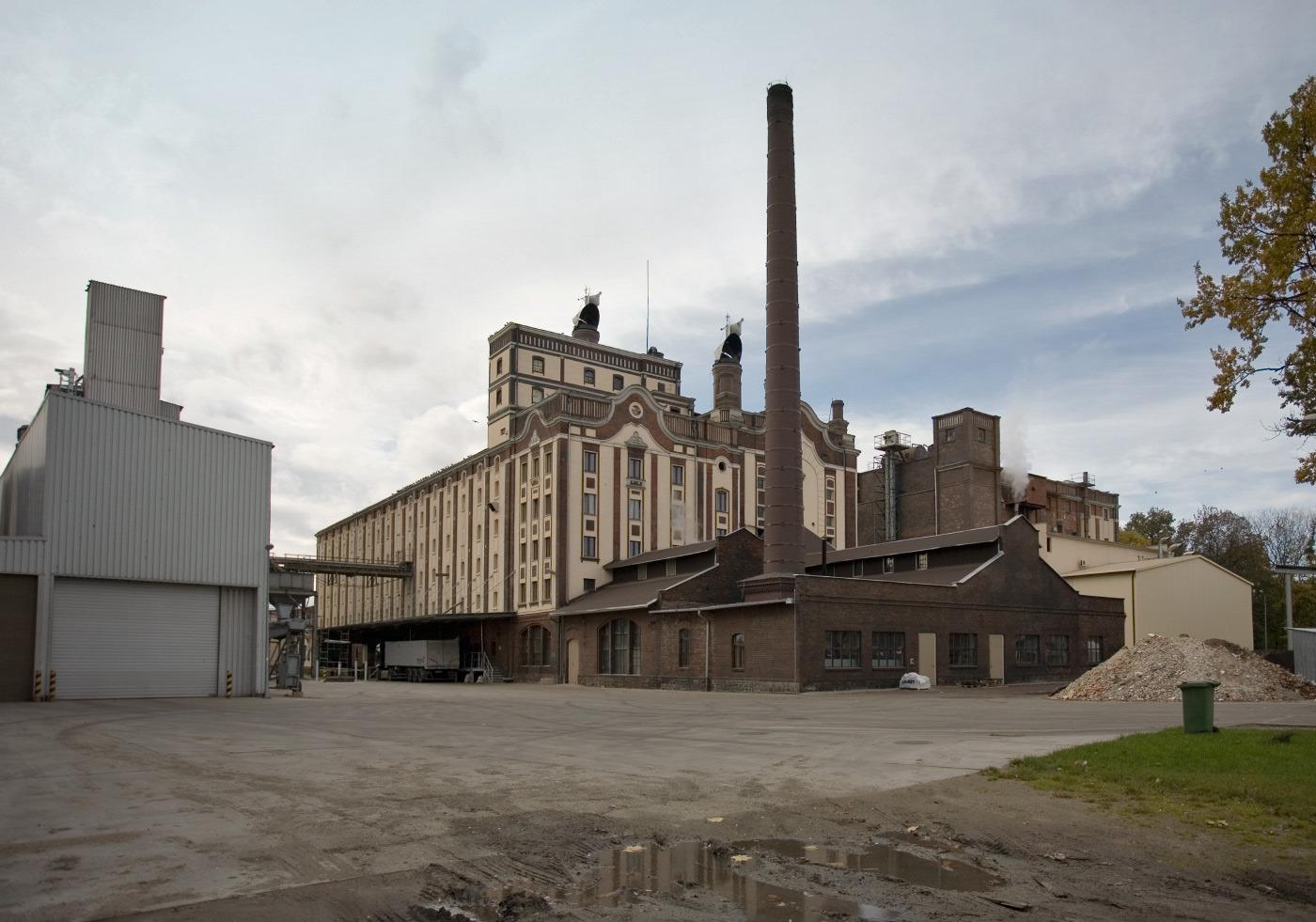 Czynna słodownia. Nawet w niedzielę para bucha a kominka. Jak mówią "kupił Duńczyk", czego można się domyśleć po nieswojskim Ordnungu. Trochę psuje atmosferę porządku to błoto na pierwszym planie, ale budynki są zadbane. Zdjęcie najzupełniej tajne/poufne, teren jest ogrodzony i strzeżony. Jednak w jedności siła - byliśmy w trójkę i dzięki temu udało się pokonać bariery (niekoniecznie dosłownie):).